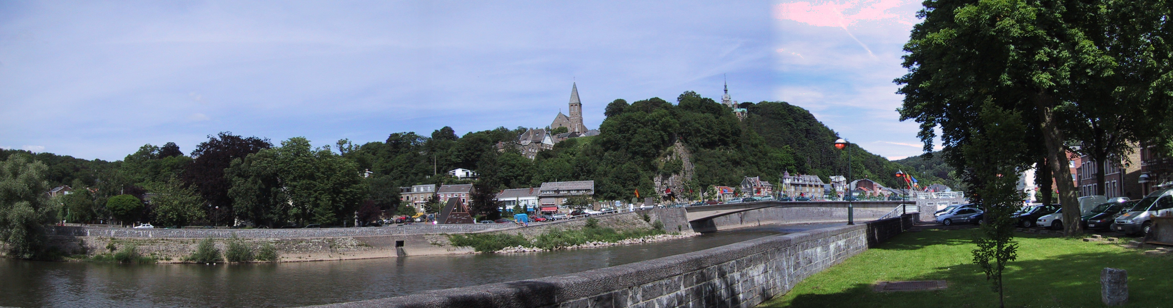 Esneux - Belgium Picture taken by Hullie Juni 2003